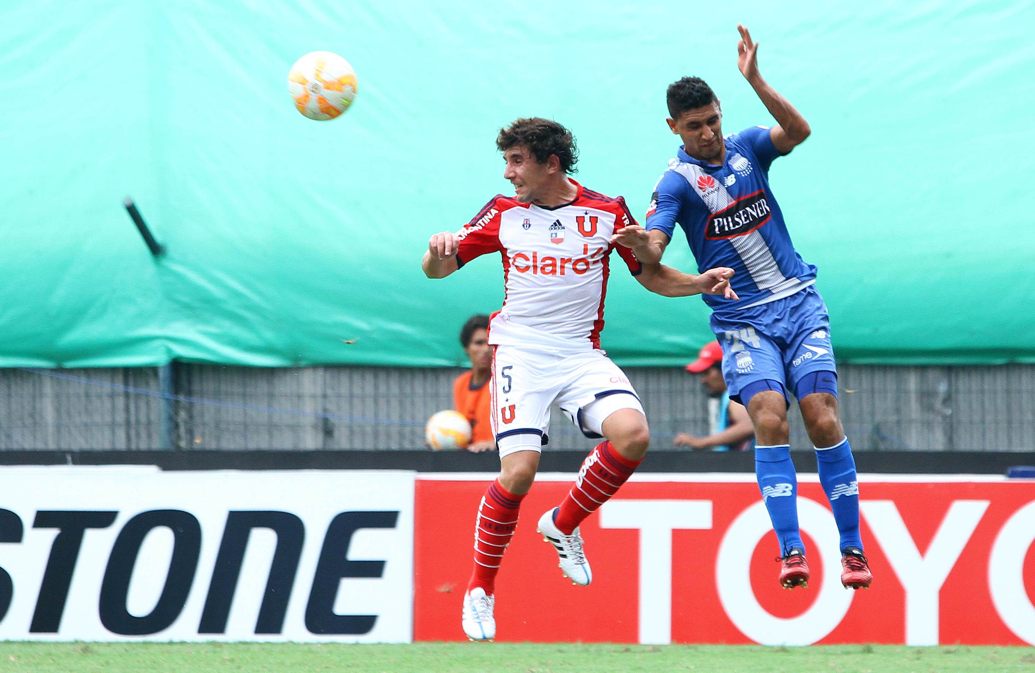 Guayaquil, 22 de abr (Andes).-Emelec gana 2x0 a la Universidad de Chile y clasifica a los octavos de la Copa Libertadores, en la gráfica Matias Corujo (5) disputa el balon con Fernando Gimenez de Emelec Foto:César Muñoz/Andes